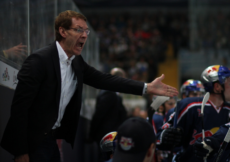 Pierre Page als Trainer des EHC Red Bull München, Olympiaeisshalle München